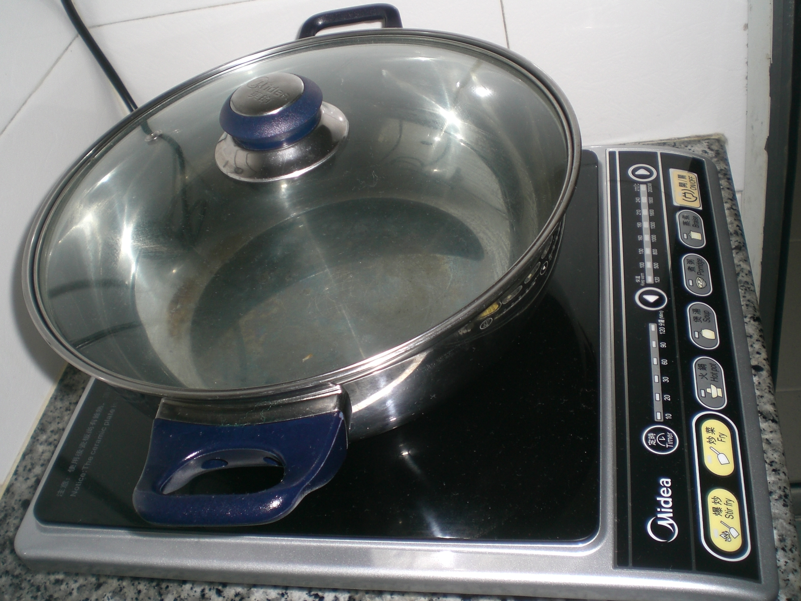 美的電磁爐